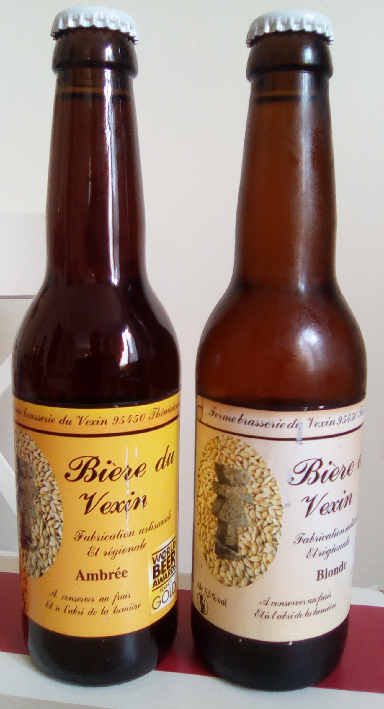 Bouteilles de la marque Bière du Vexin (ambrée et blonde)